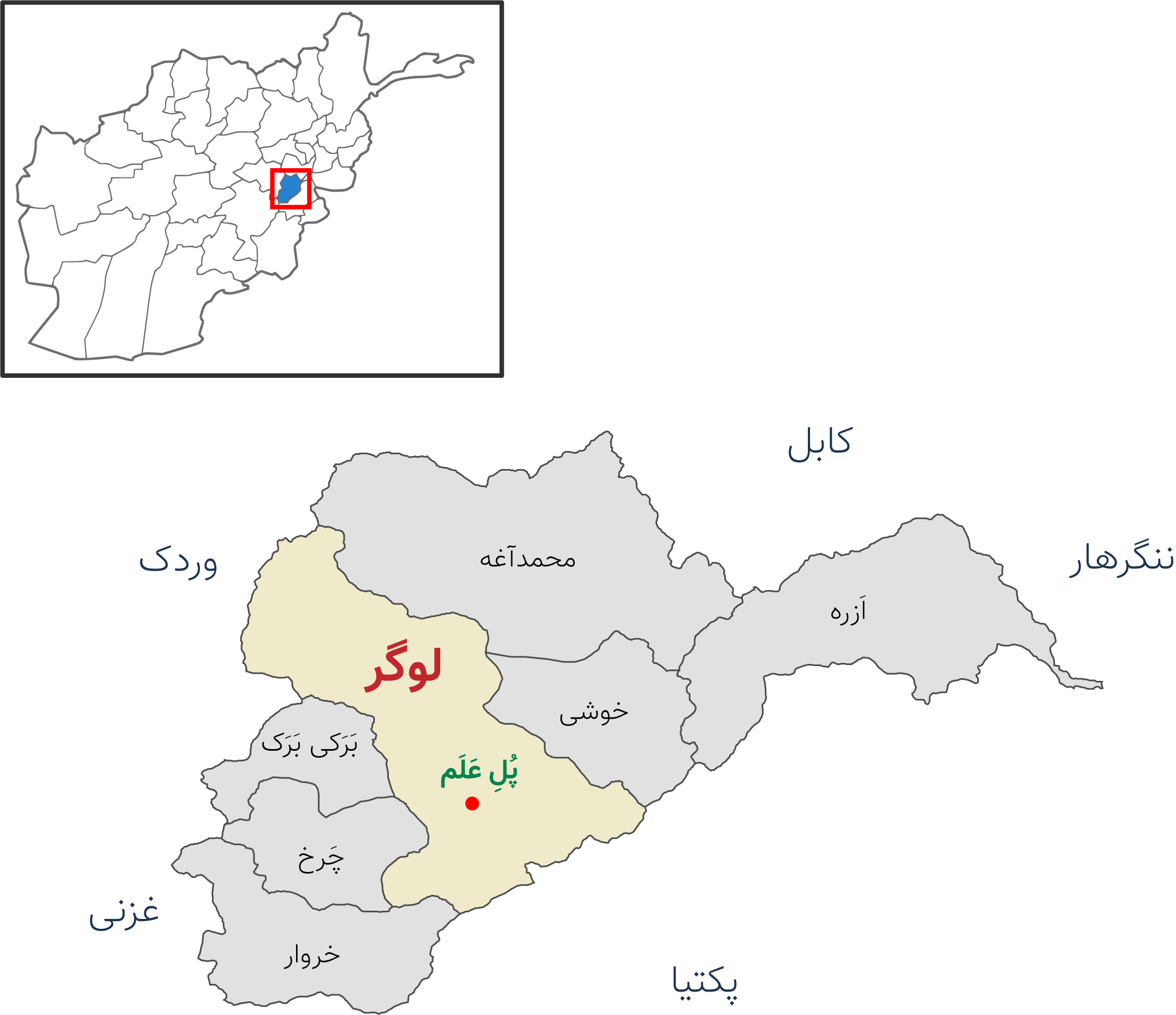 نقشه ولایت لوگر